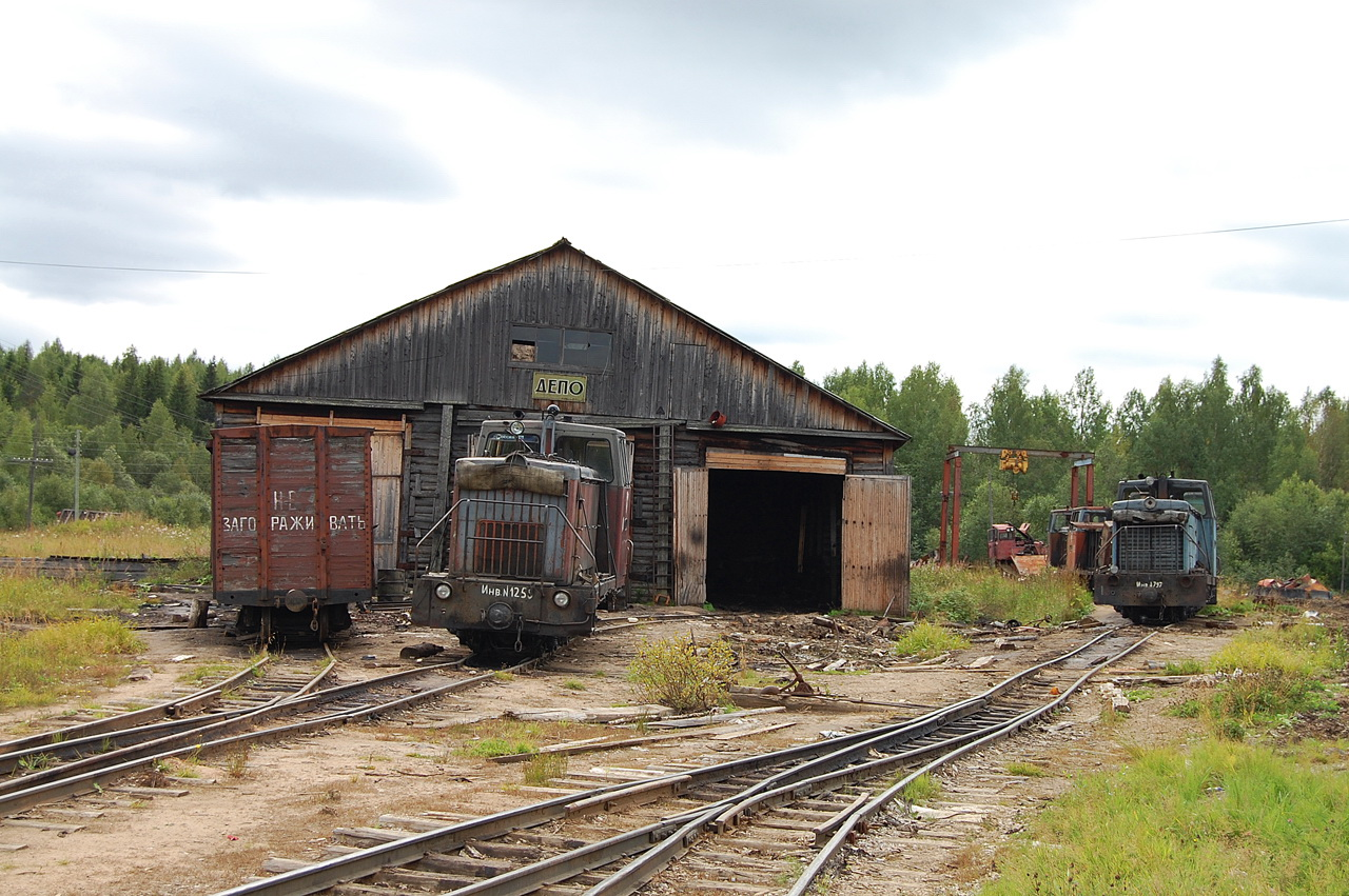 Лойгинская УЖД